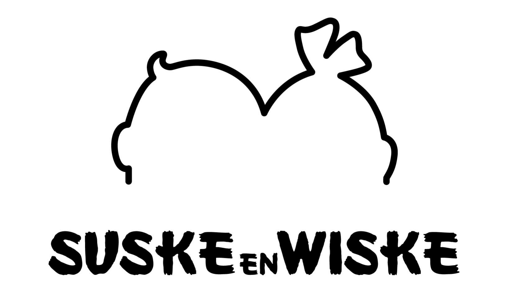 Logo des Comics Suske und Wiske (Originaltitel)